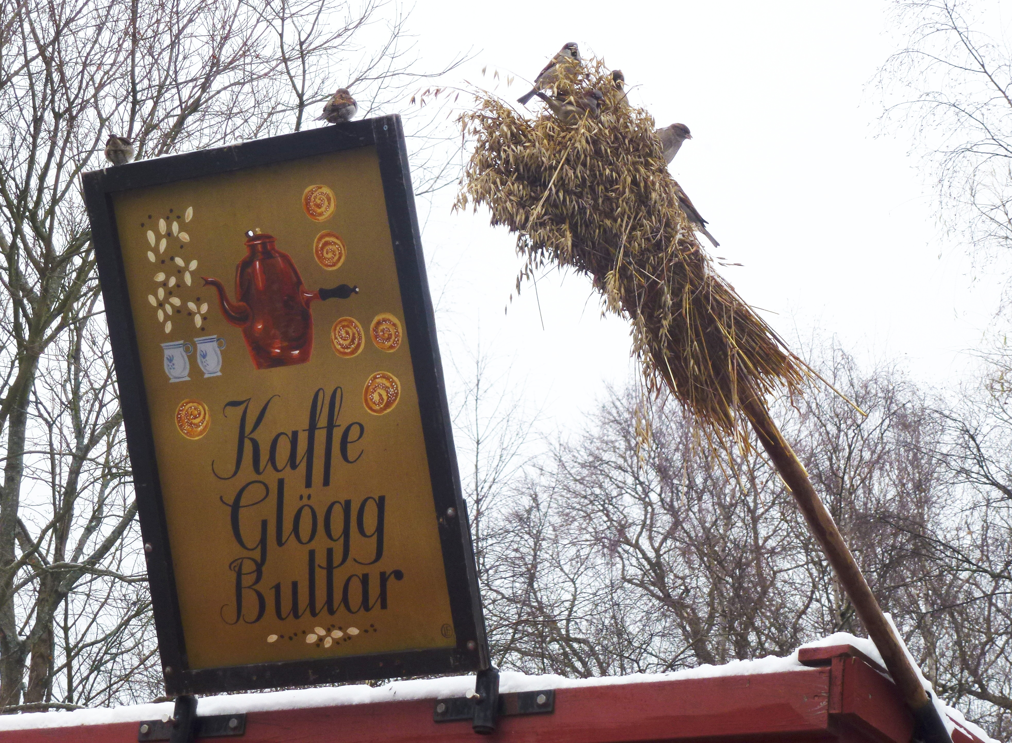 Skansens julmarknad 2013